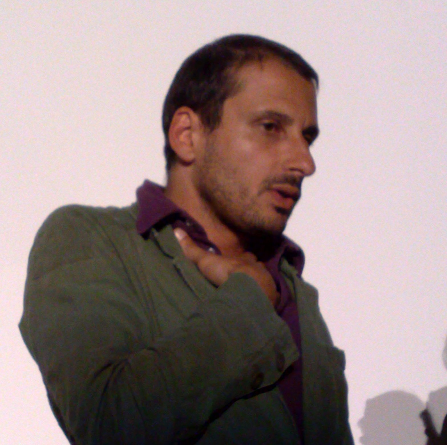 Safy Nebbou est venu à Lille pour présenter son deuxième film, L'Empreinte de l'Ange